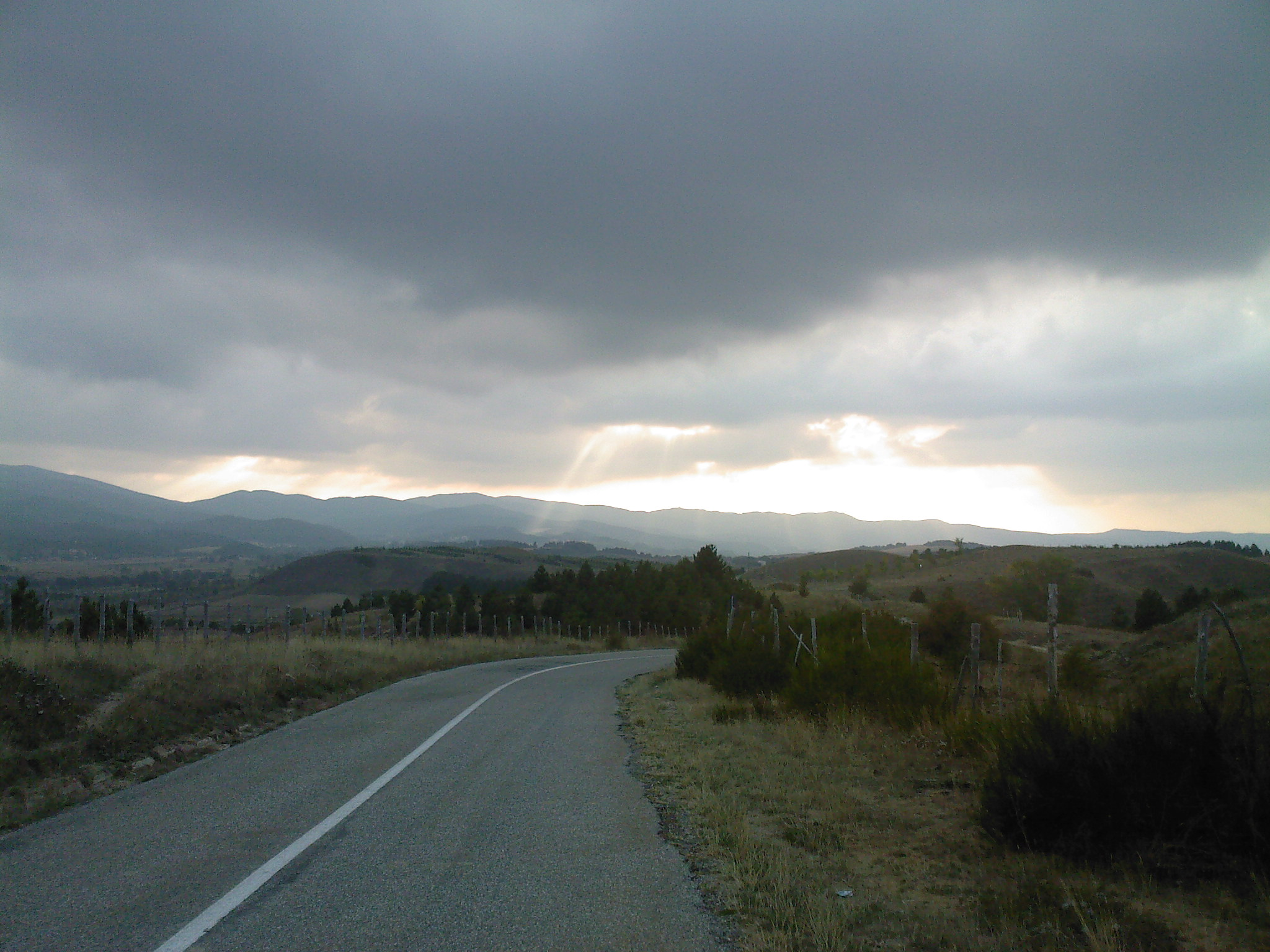 Sila. Raggio di sole